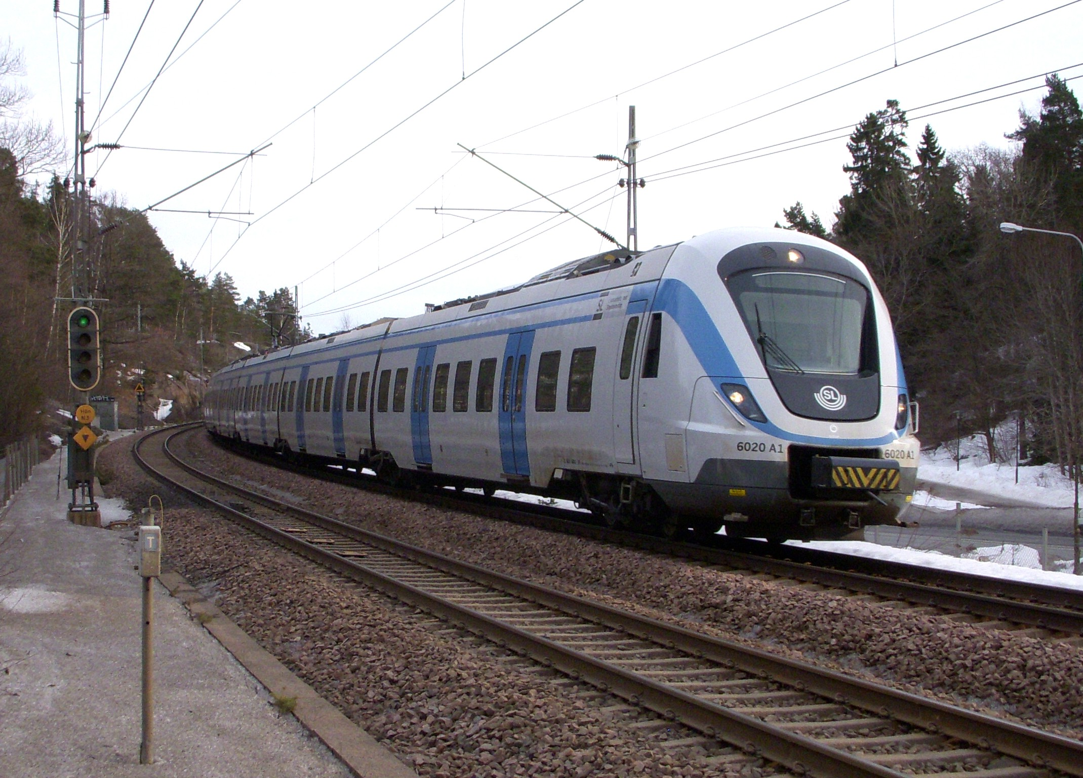 Nynäsbanan vid Fagersjövägen/Magelungsvägen